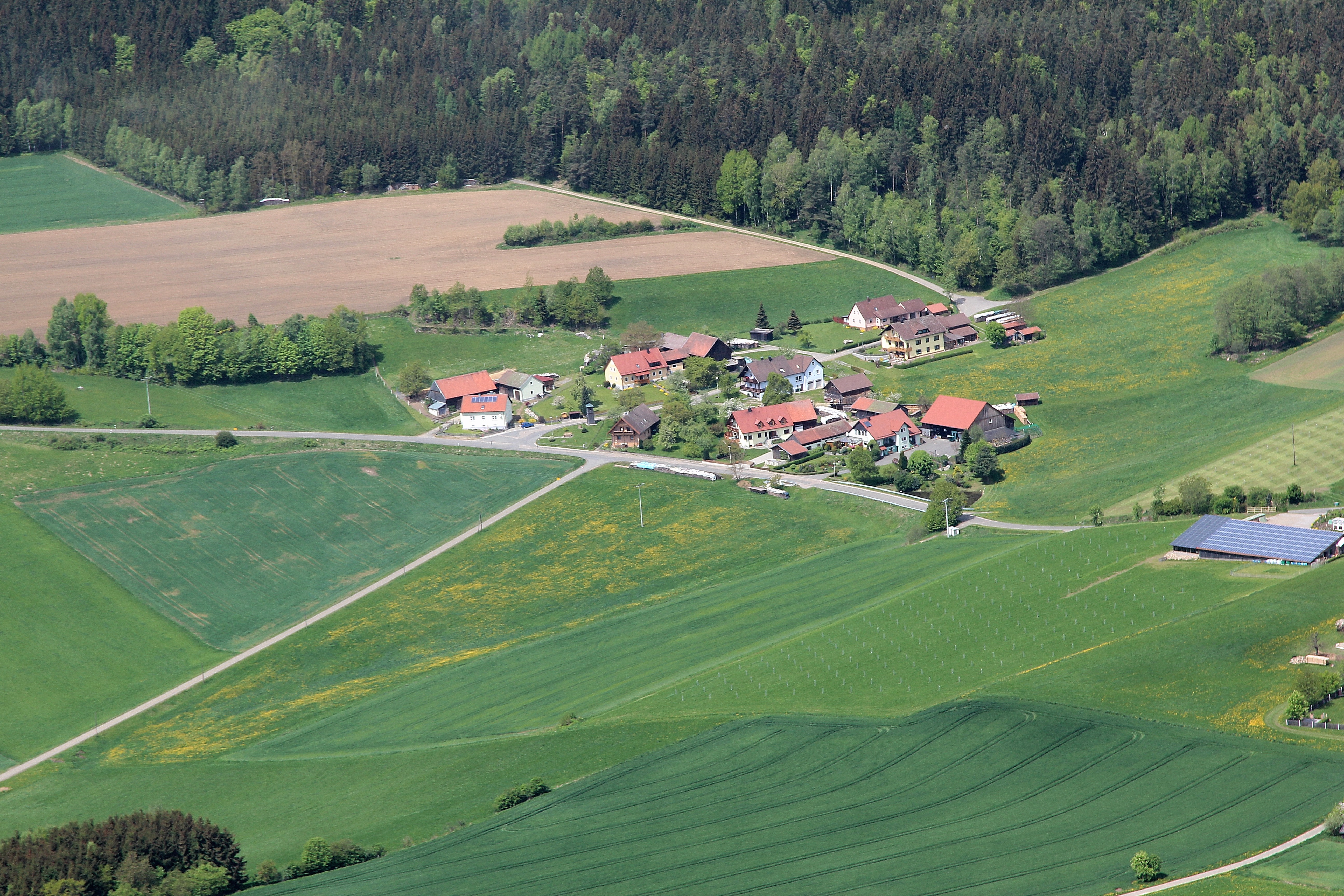 Weiherhäusl, Gemeinde Teunz, Landkreis Schwandorf, Oberpfalz, Bayern (2015)